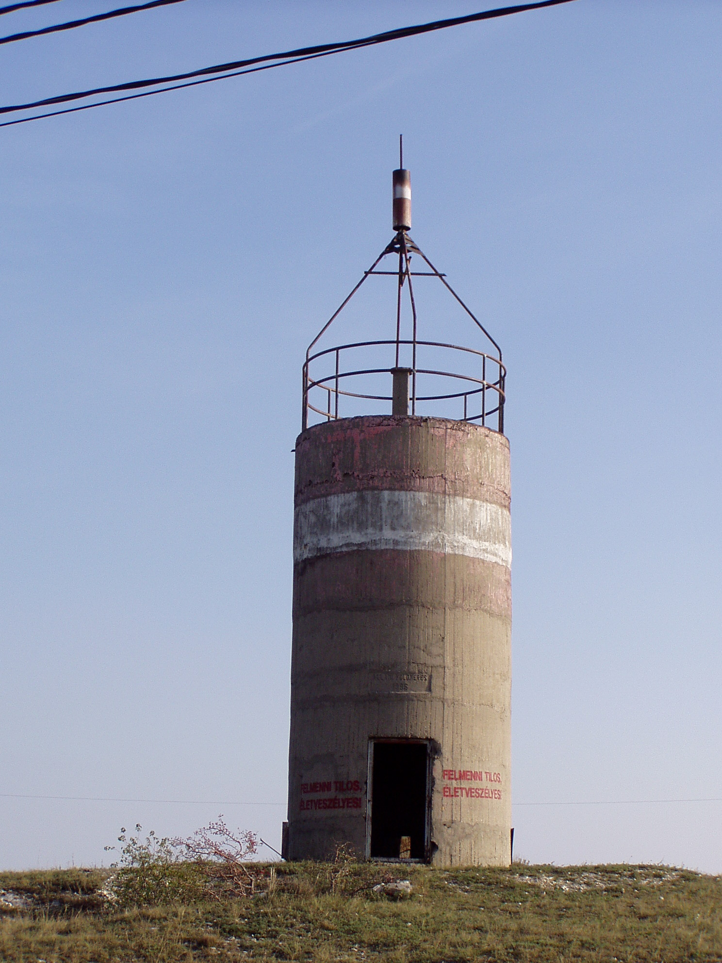 Iszka-hegyi mérőtorony